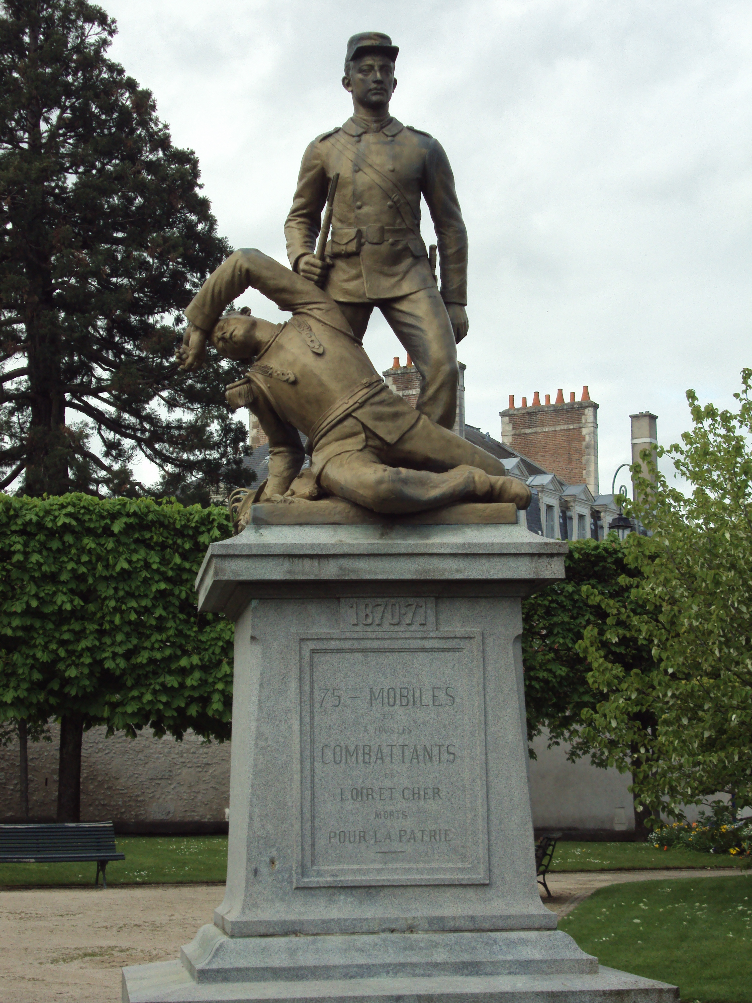 Monuments aux morts du 75e mobile pour les soldats morts durant la guerre franco-prussienne de 1870. Commune de Blois, non loin de la gare.